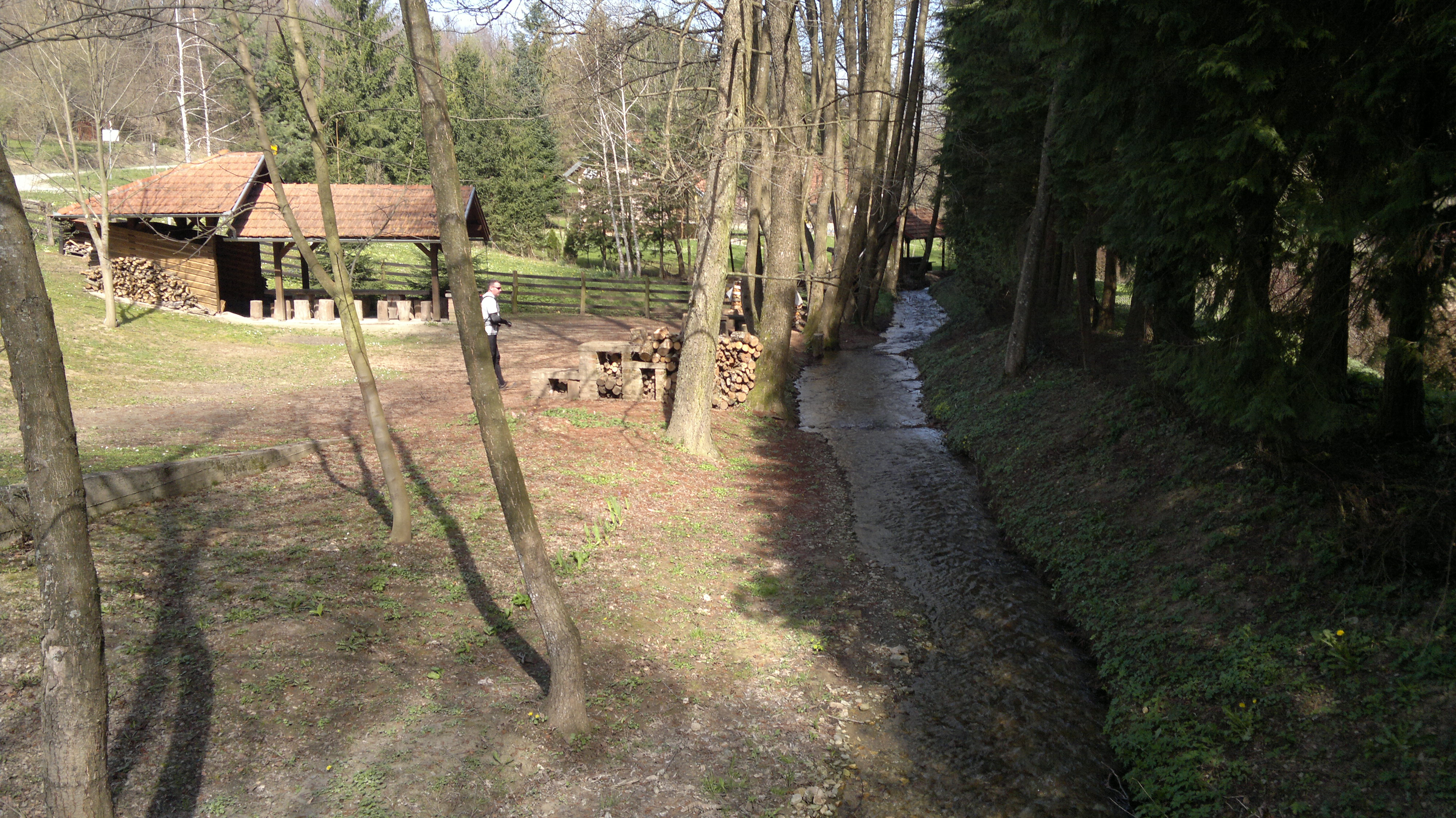 33515, Šumeđe, Croatia